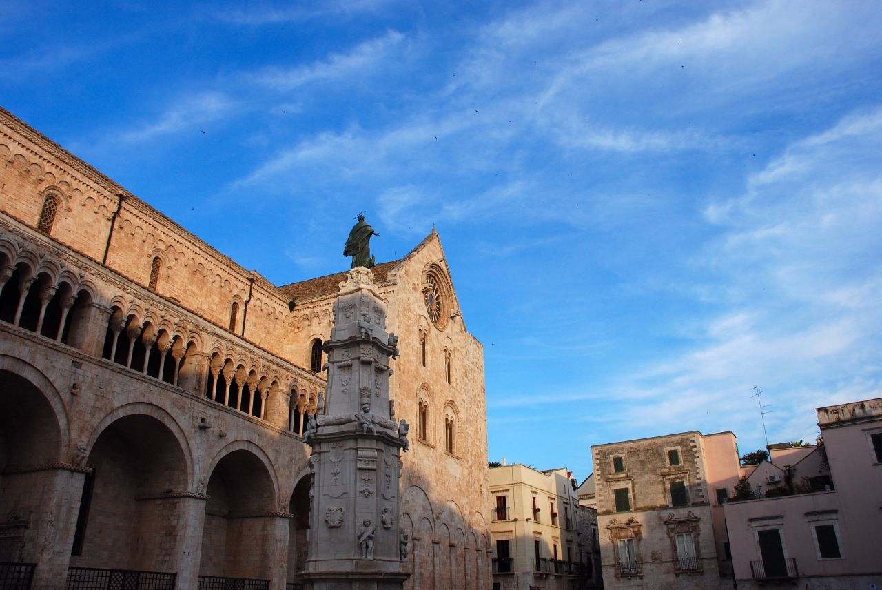 Cattedrale di Bitonto